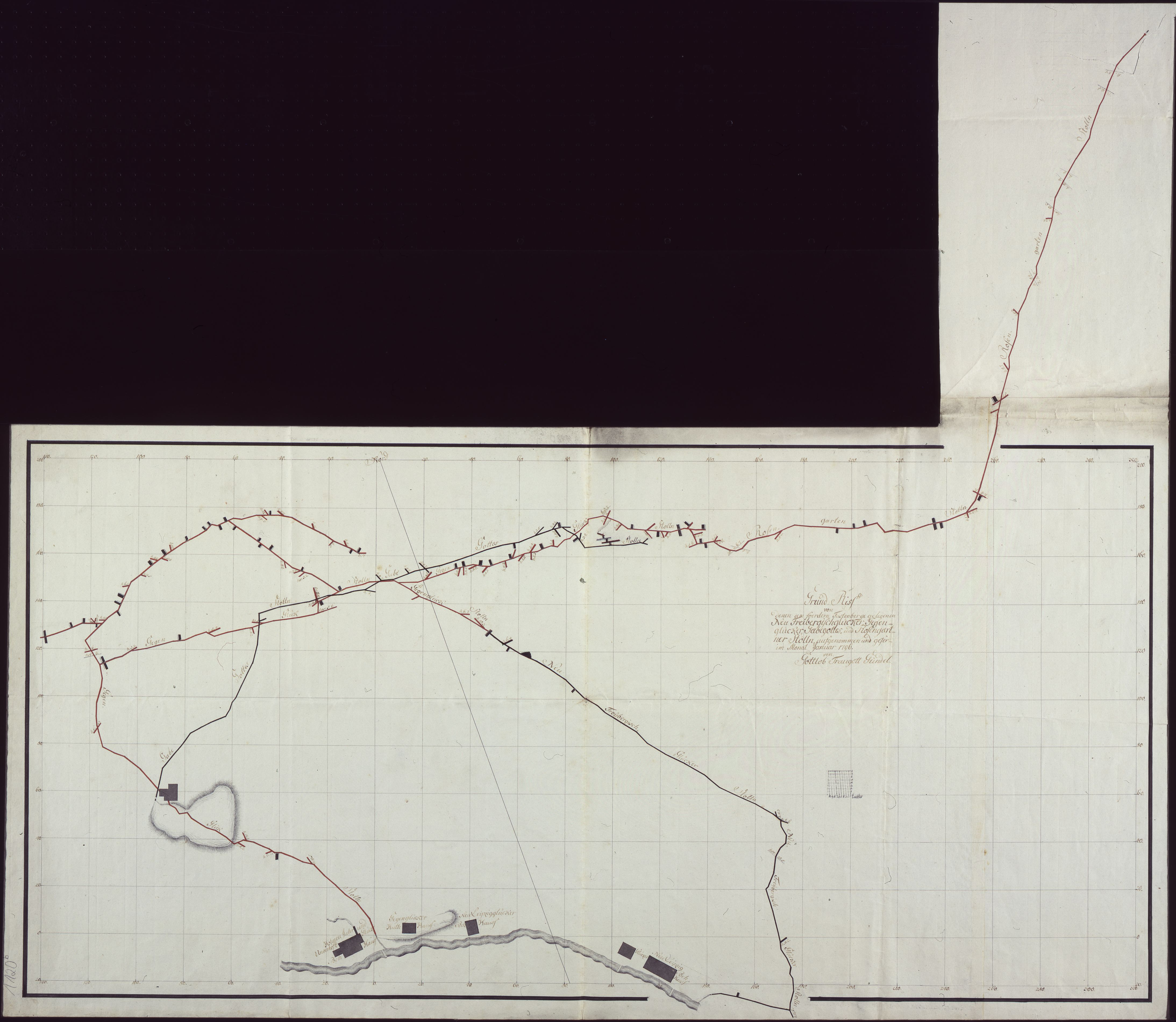 Grundriss Stollen vorderer Fastenberg, 1796: Grund Riß von denen am foerdern Fastenberge gelegenen Neu Freibergischglücker-, Gegenglücker=Gabegottes und Rosengartner Stolln / aufgenommen und gefer. im Monat Januar 1796. von Gottlob Traugott Gündel. - [S.l.], 1796. - 1 Kt. : mehrfarb. ; 120 x 62 cm. NE oben. - Mit Kt.-Netz